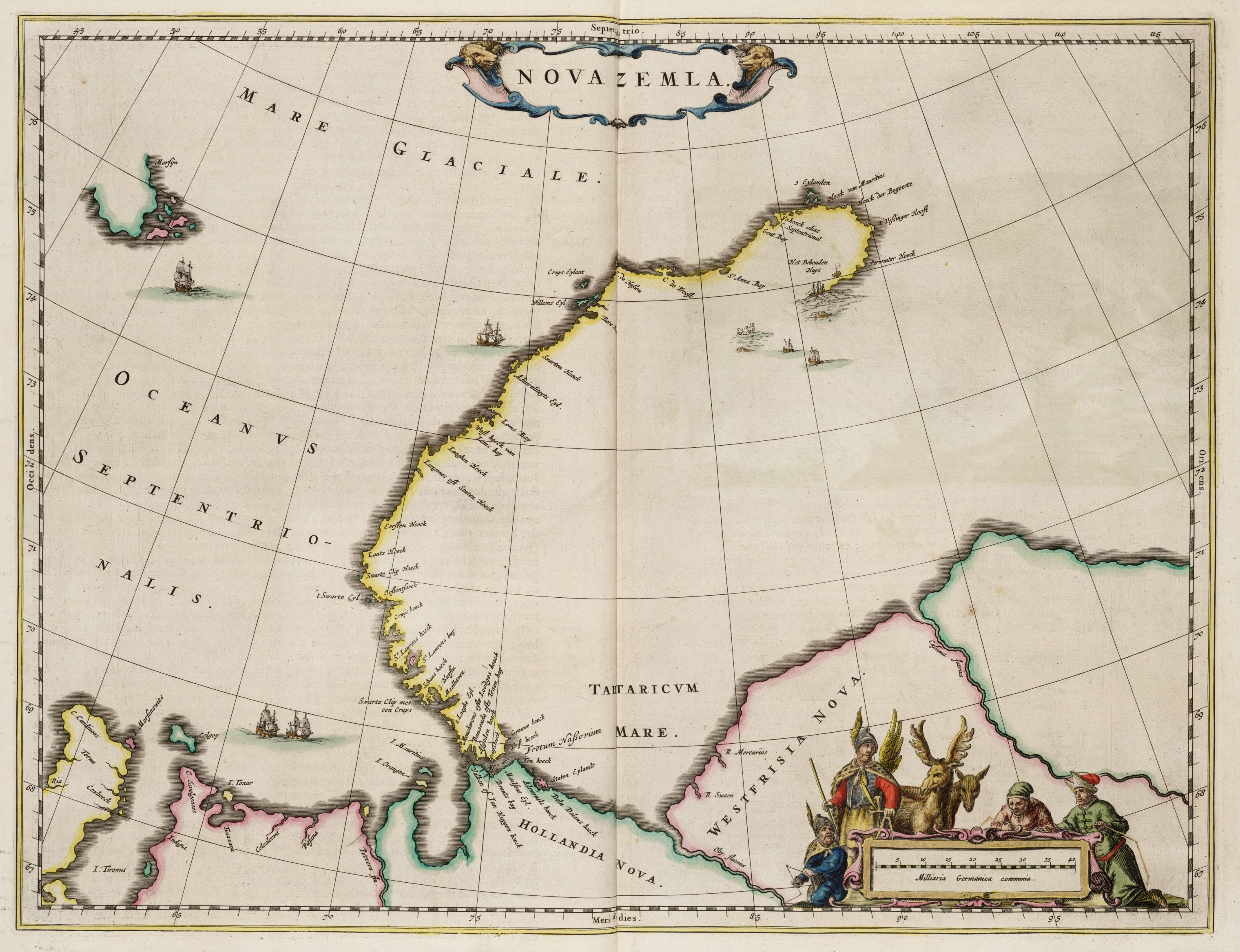 Map of Novaya Zemlya. Title "Nova Zemla"